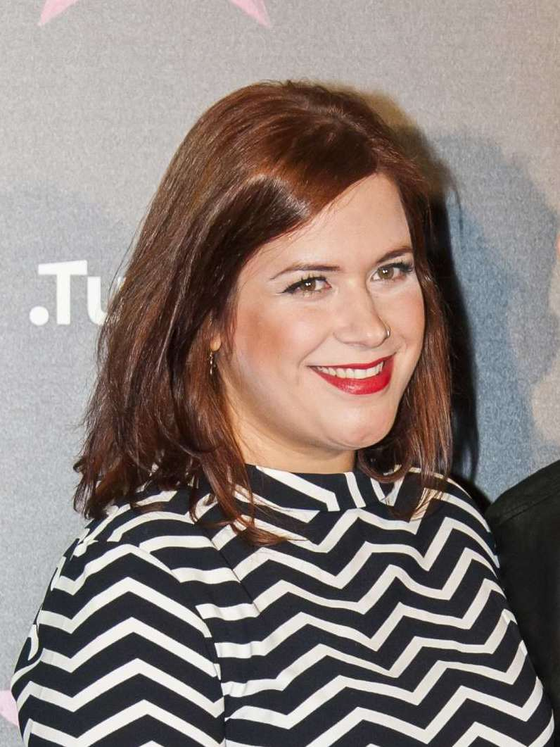 Fotos del photocall y fiesta de lanzamiento de un nuevo canal de televisión en España.